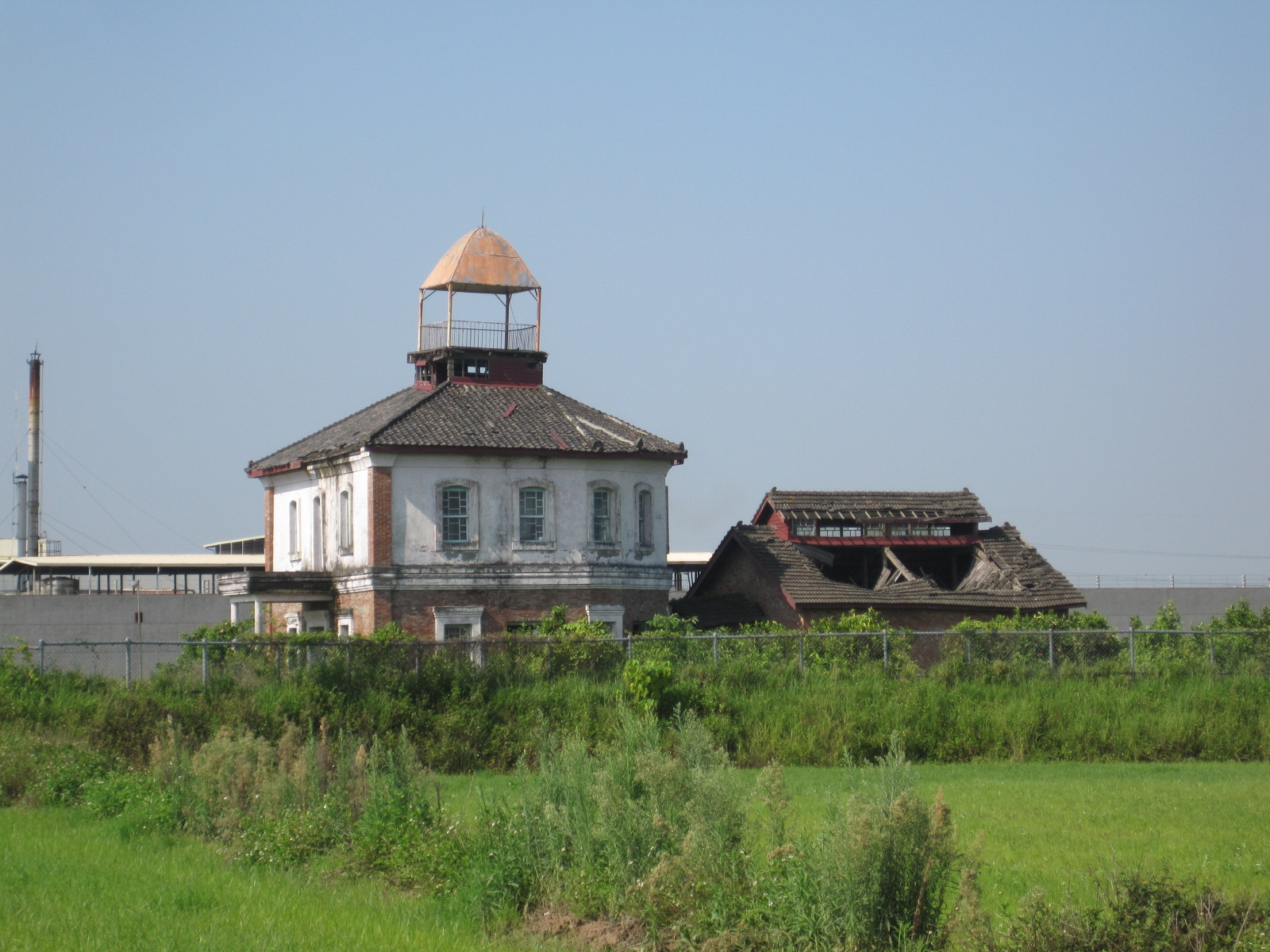 日治時期建造的臺南刑務所所殘存之中央臺